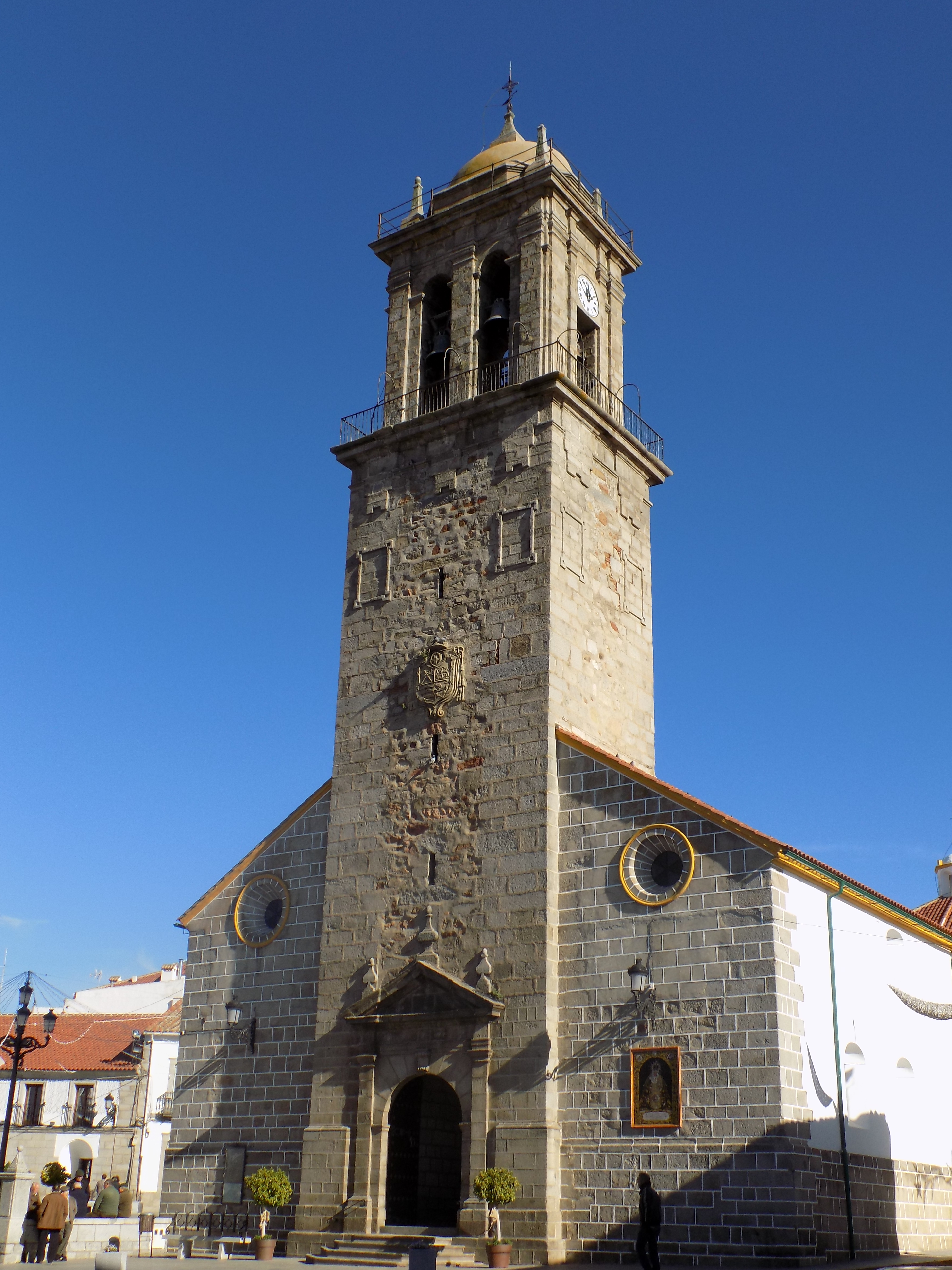 Torre de la iglesia de San Miguel Arcángel de Villanueva de Córdoba, provincia de Córdoba, (Spain).